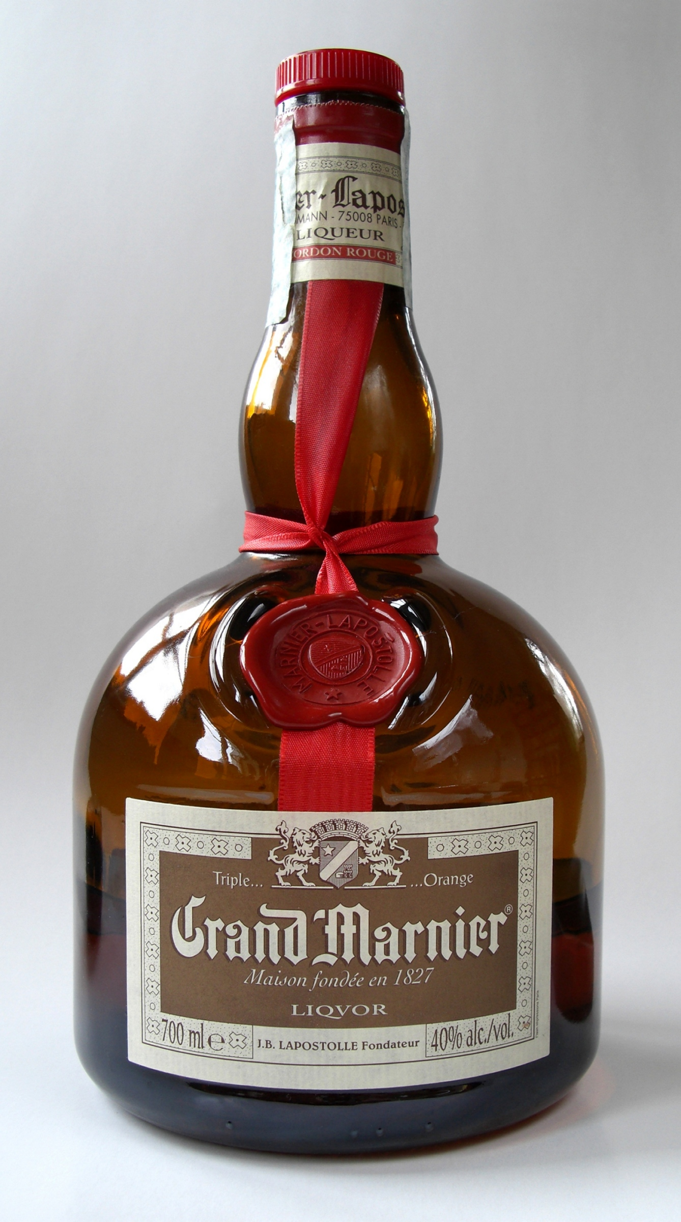 See title